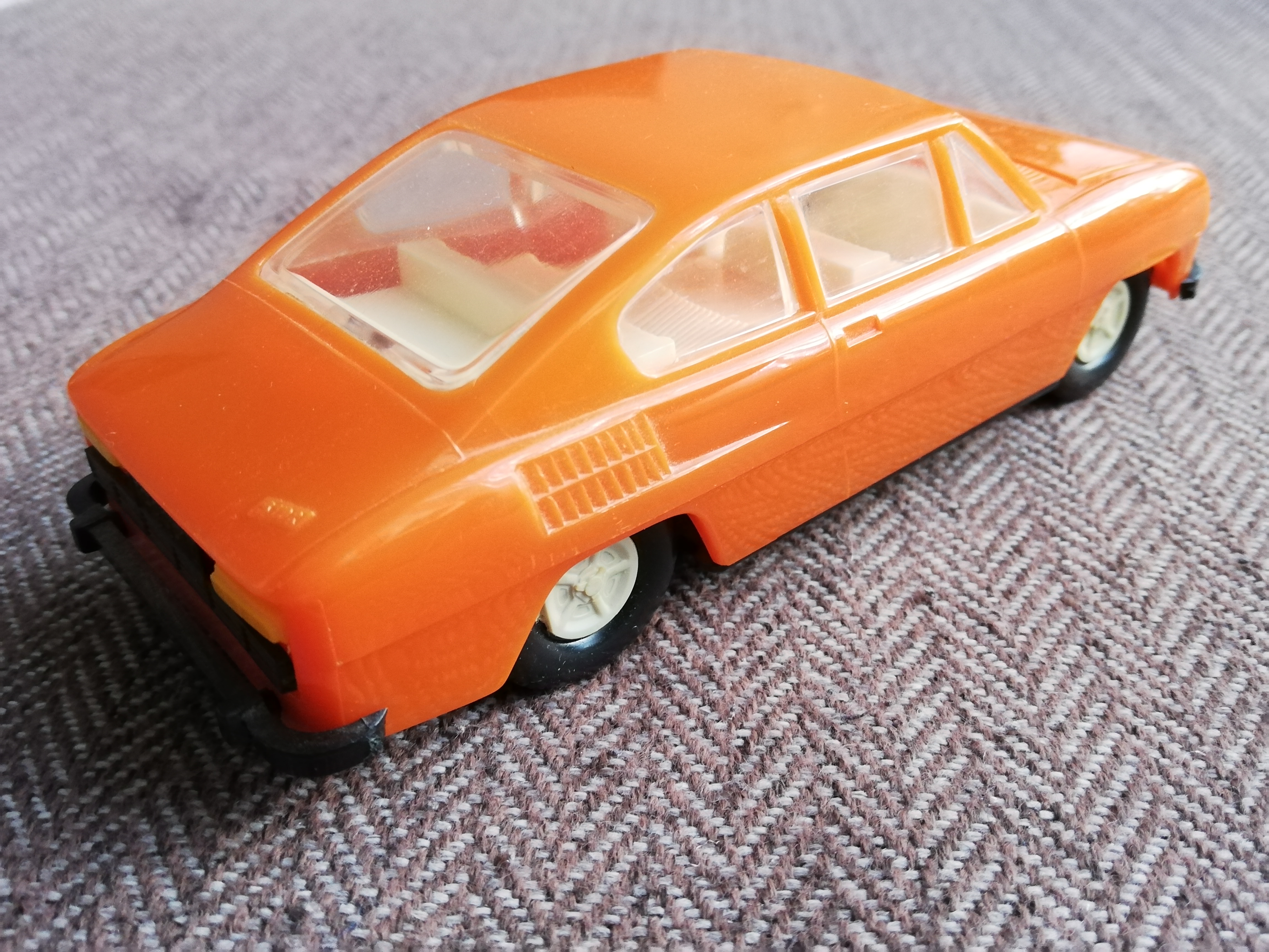 Škoda 110R schaal 1:30 van VEB Plasticart Zschopau (DDR)